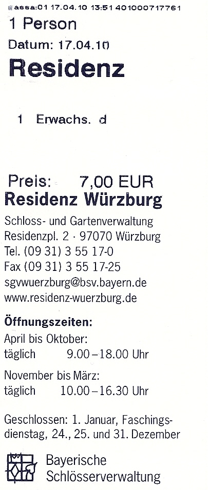 Würzburger Residenz - Eintrittskarte